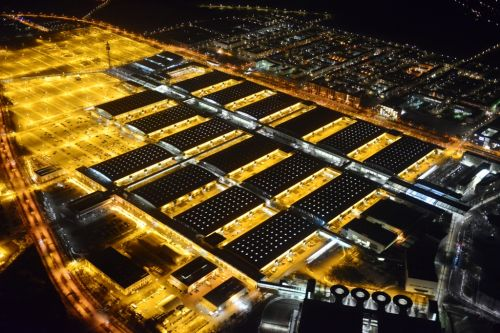 MüNCHEN 19.02.2015 Nachtluftbild der beleuchten Ausstellungshallen am Messegelände München im Bundesland Bayern.